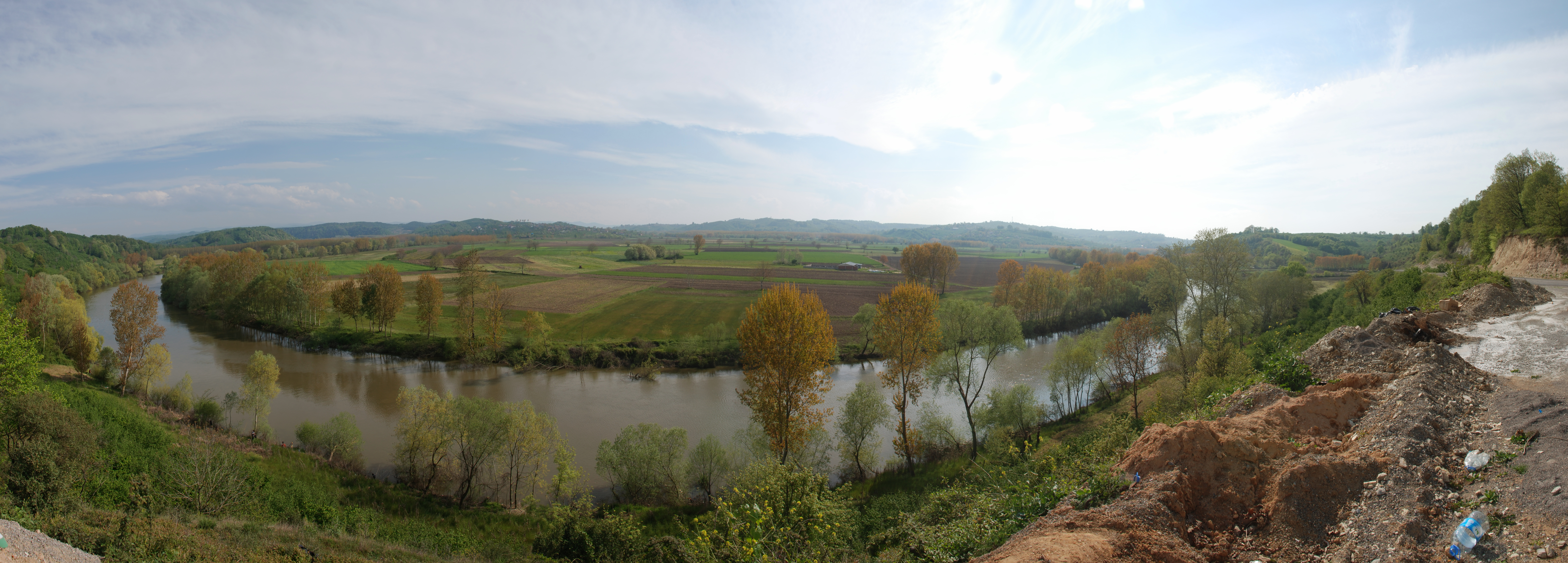 Sakarya Nehri, Sakarya, Karasu ilçesi Manavpınarı- Hürriyet köyleri arası.